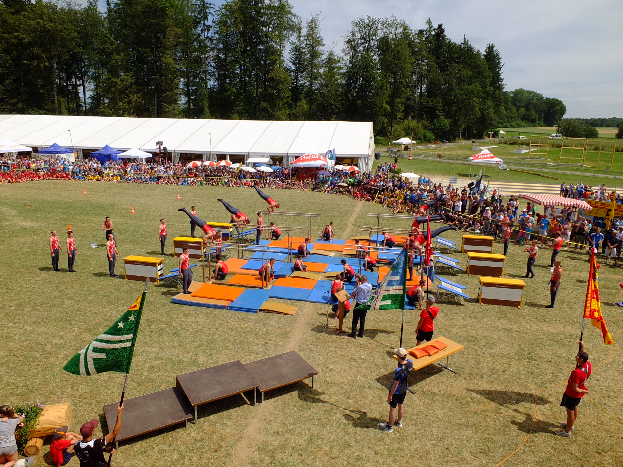 Vorführung des TV Sulz auf dem Festgelände im Gebiet Bossenhaus der Gemeinde Mettauertal.